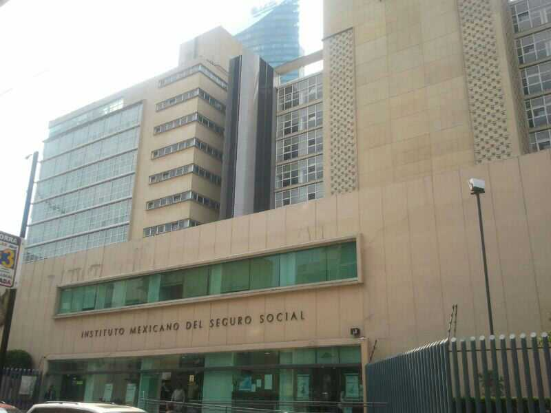 Centro de trabajo